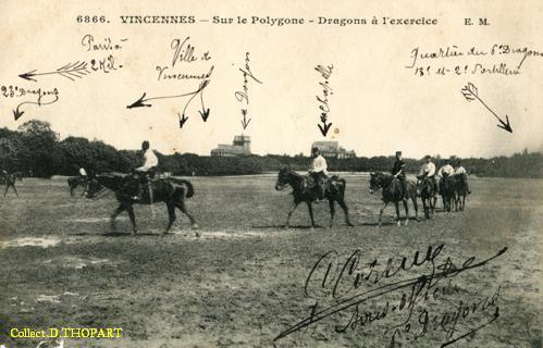 6eme Dragons à Vincennes